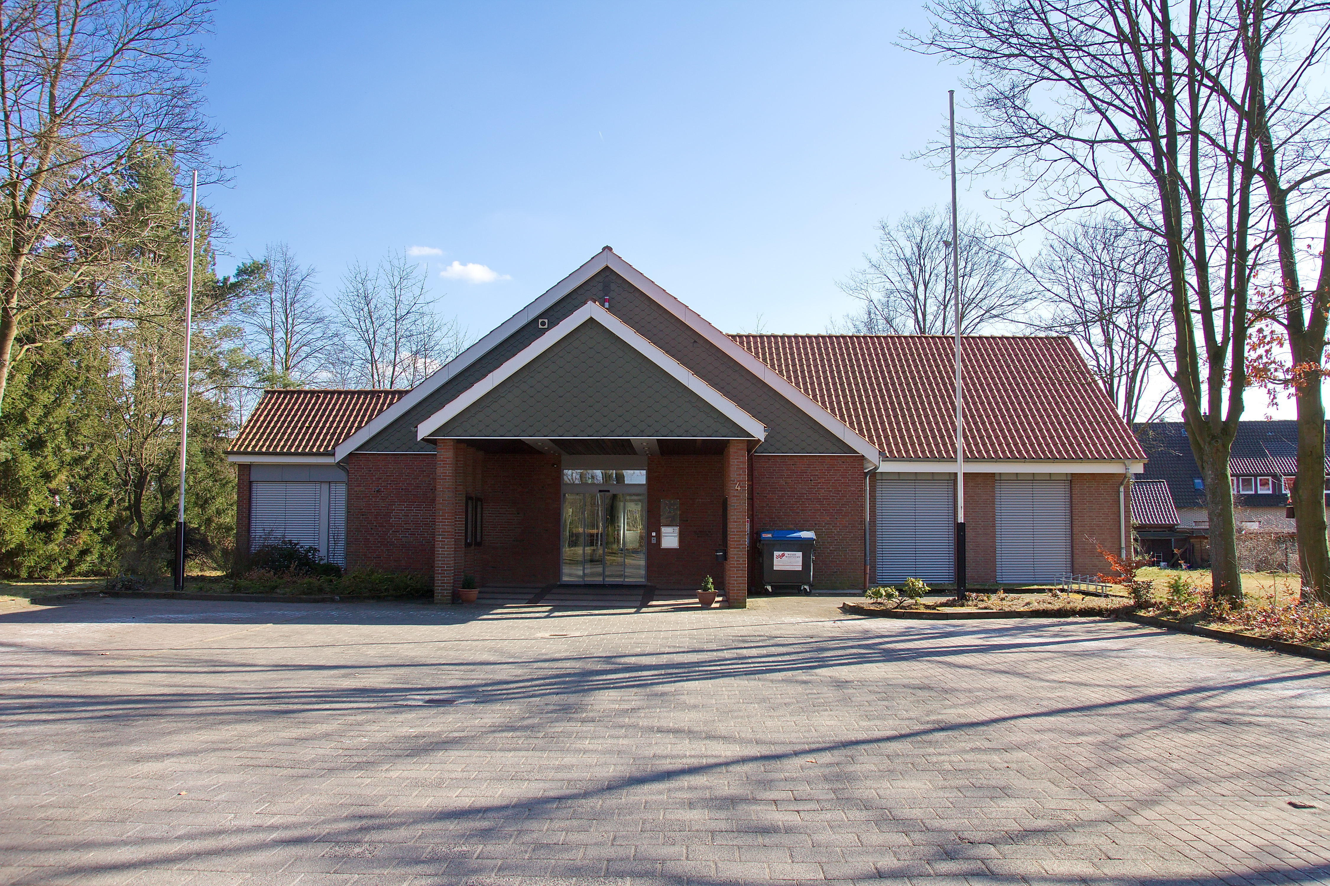 Rohrsen in Niedersachsen, Deutschland